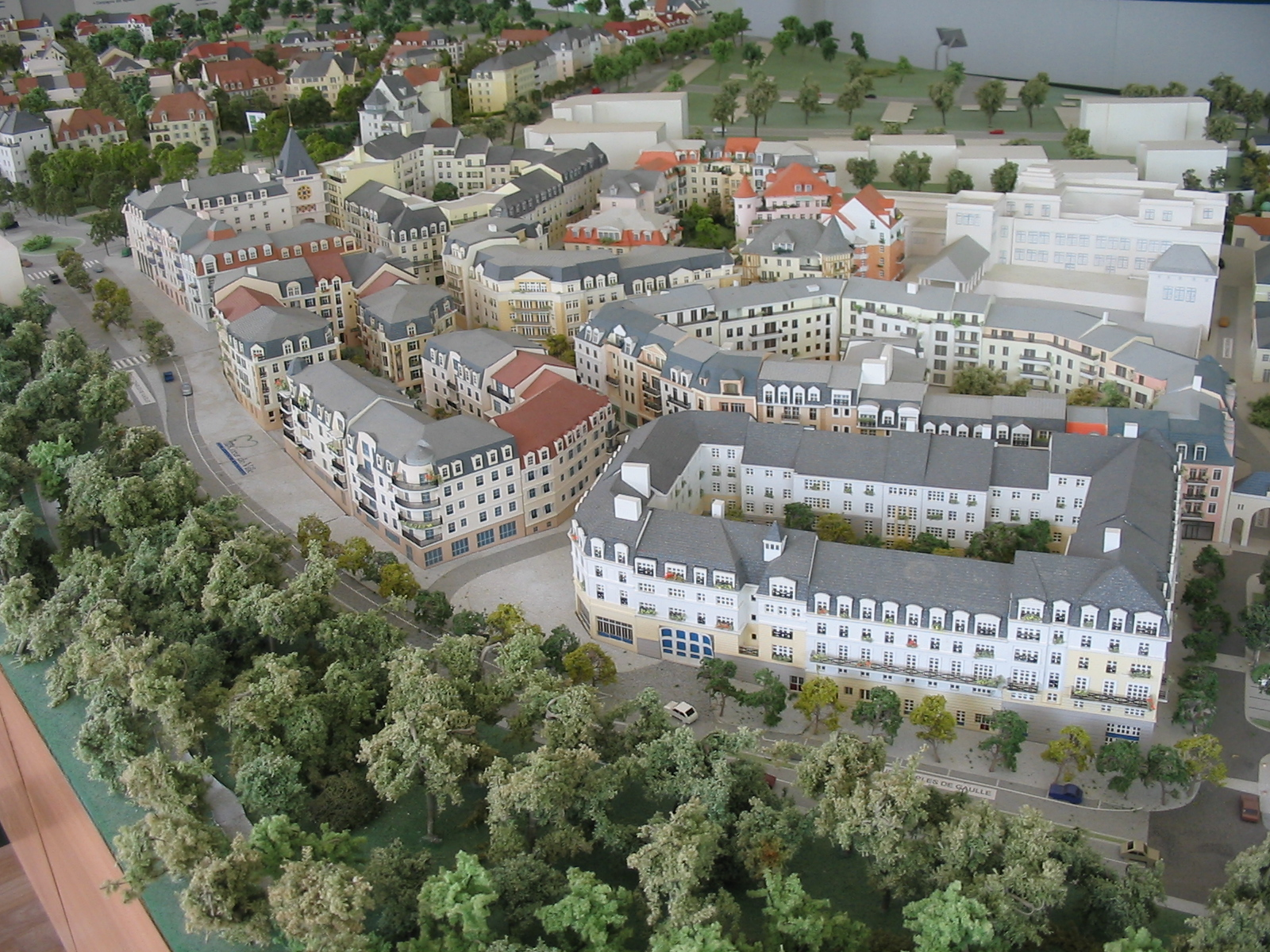 Maquette d'urbanisme du projet de Coeur de Ville du Plessis-Robinson (92).